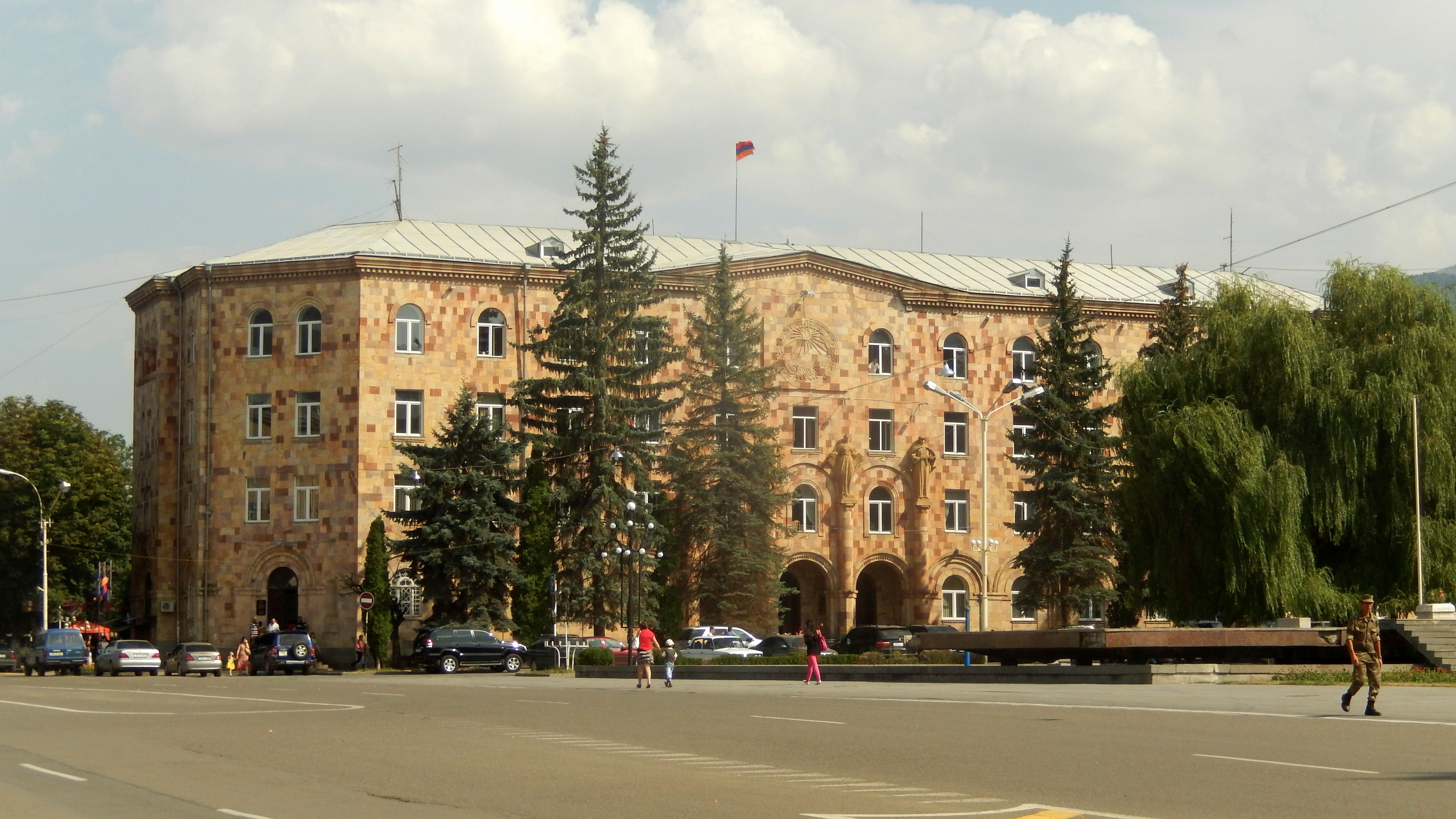 Վանաձորի քաղաքապետարանի շենքը